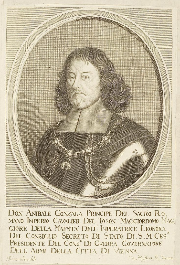 Grafik aus dem Klebeband Nr. 1 der Fürstlich Waldeckschen Hofbibliothek Arolsen Motiv: Annibale Gonzaga